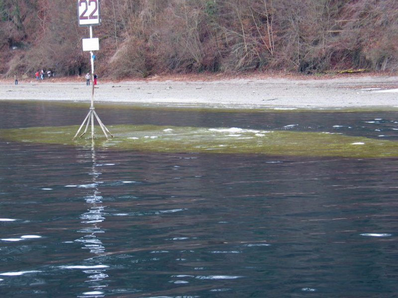 Teufelstisch am Bodensee beim Jahrhunderttiefstand Aufnahme vom Schiff im Rahmen einer Sonderfahrt Date = 18.02.2006 Author = Rainer Sachsenberg